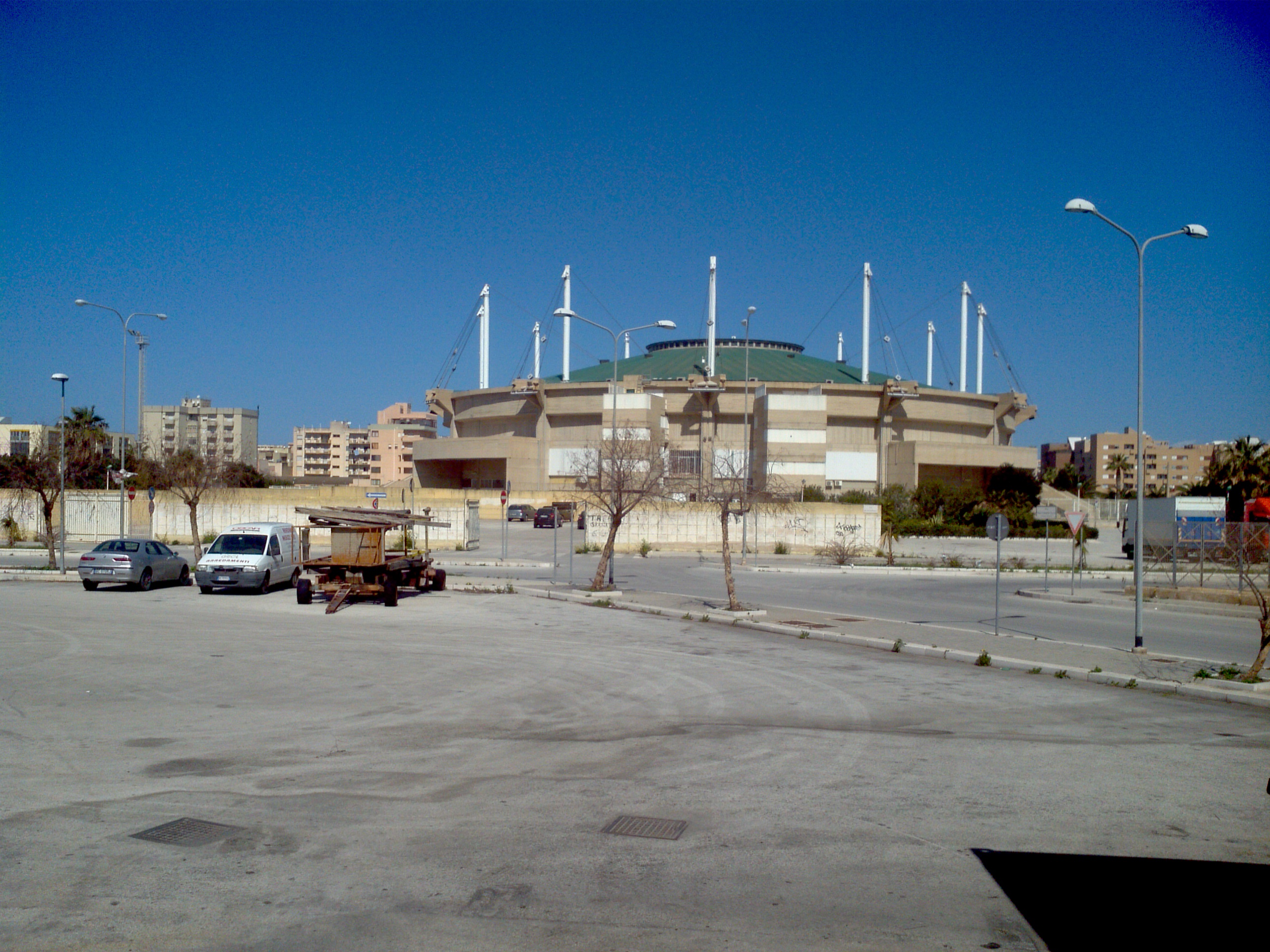 Palailio-Stadion in Trapani, Sizilien